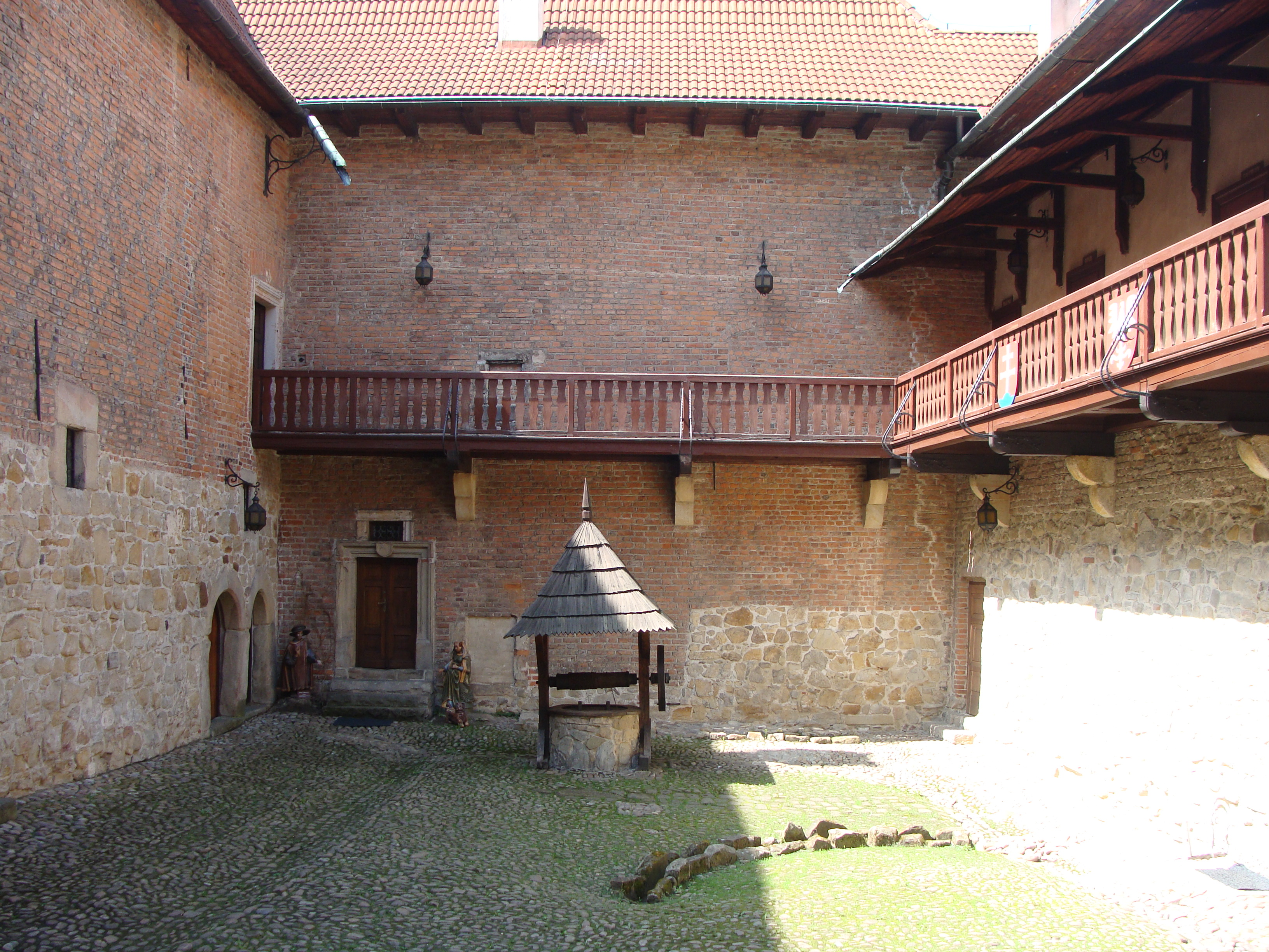 Dębno. Dziedziniec zamkowy